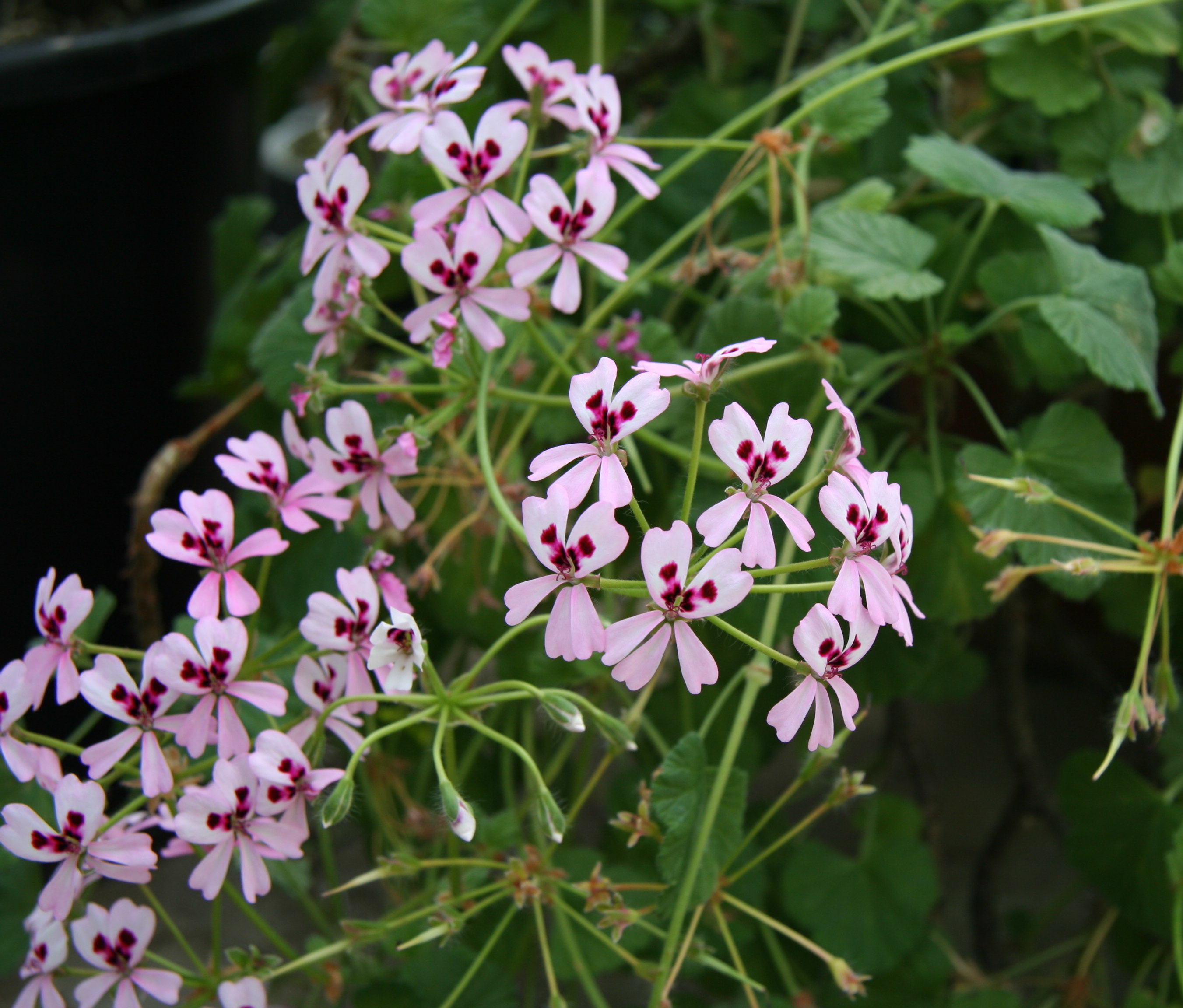 Pelargonium echinatum im Botanischen Garten Dresden